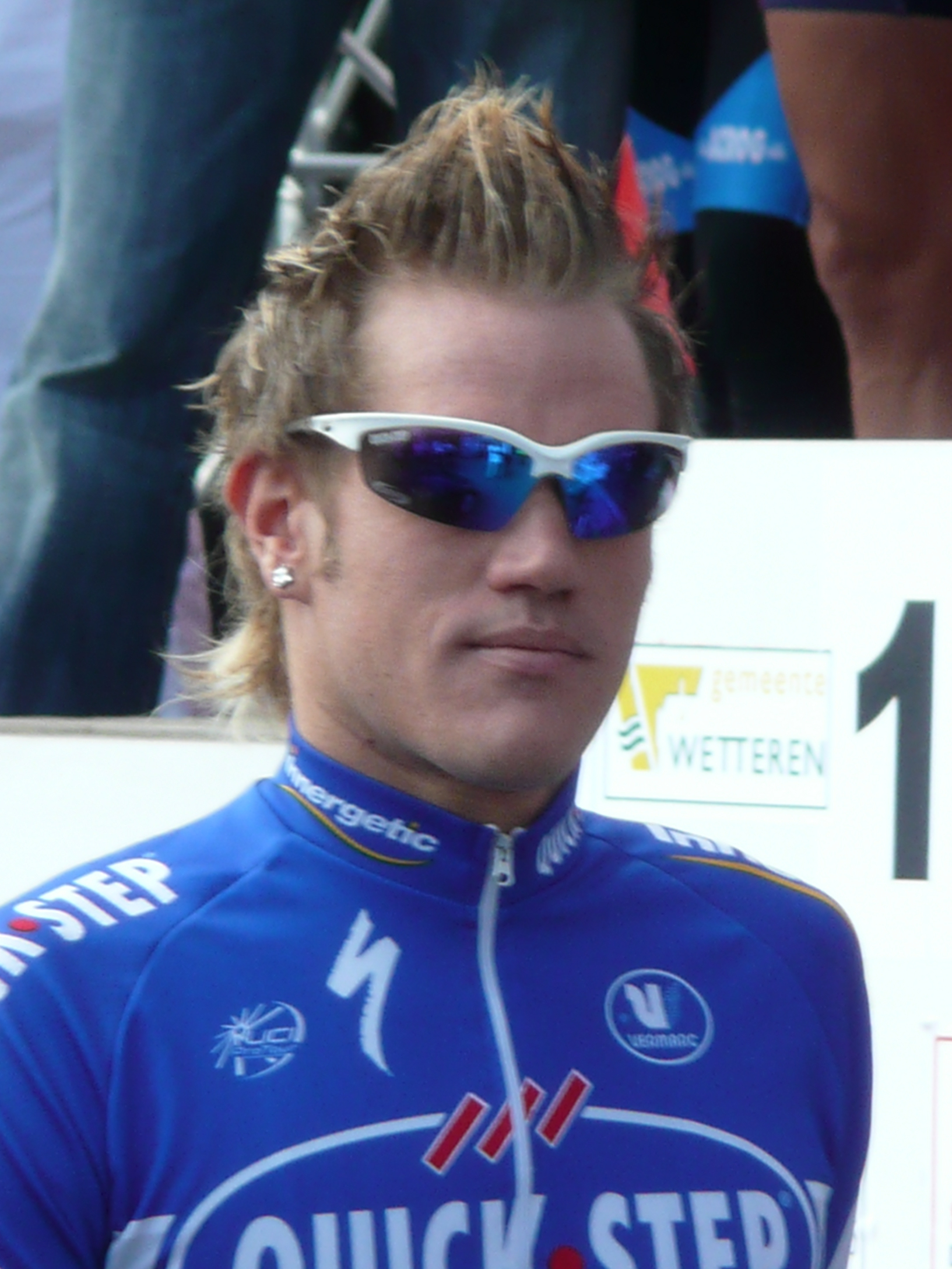 Wouter Weylandt tijdens het Dernyfestival in Wetteren 2007